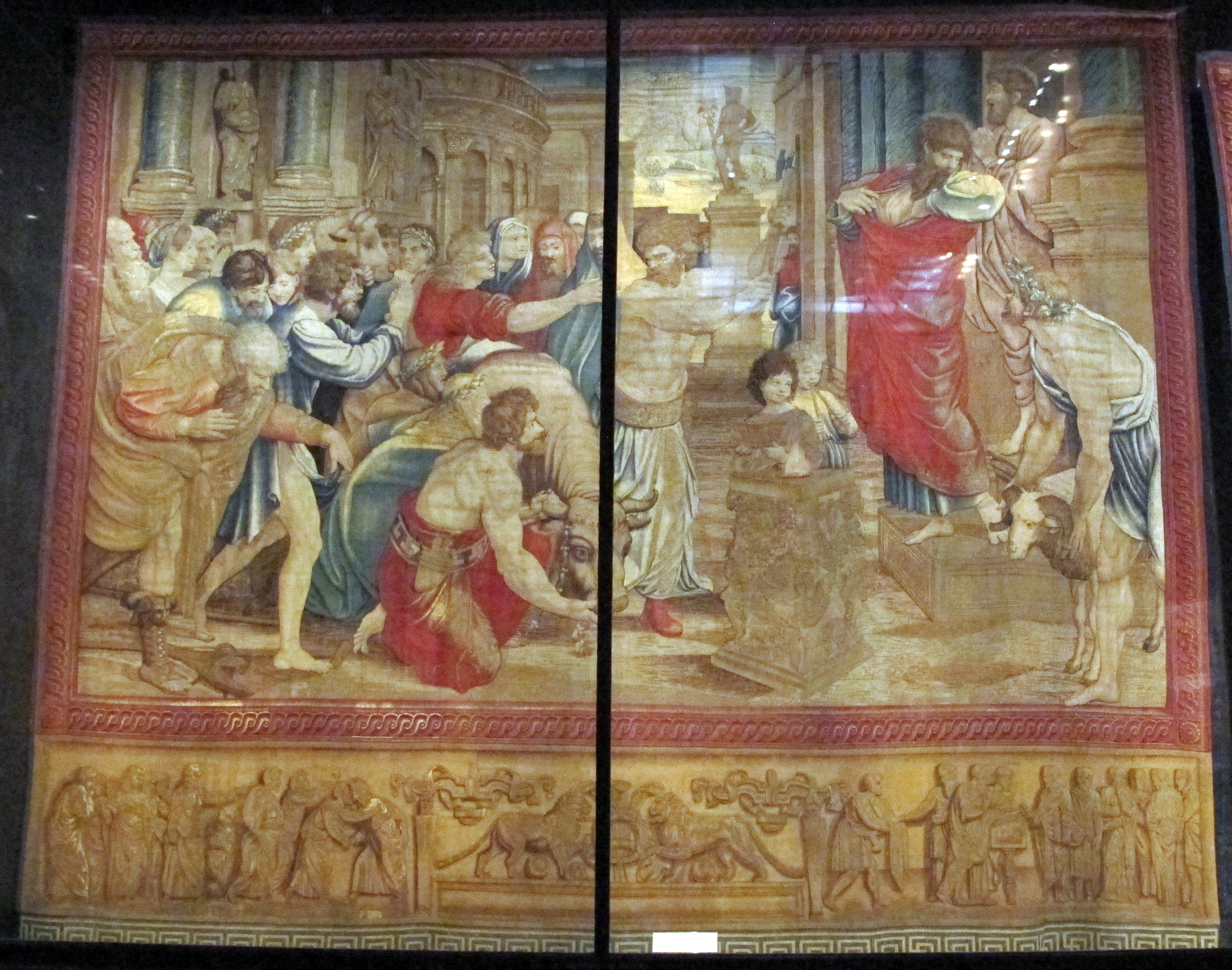 Pinacoteca Vaticana